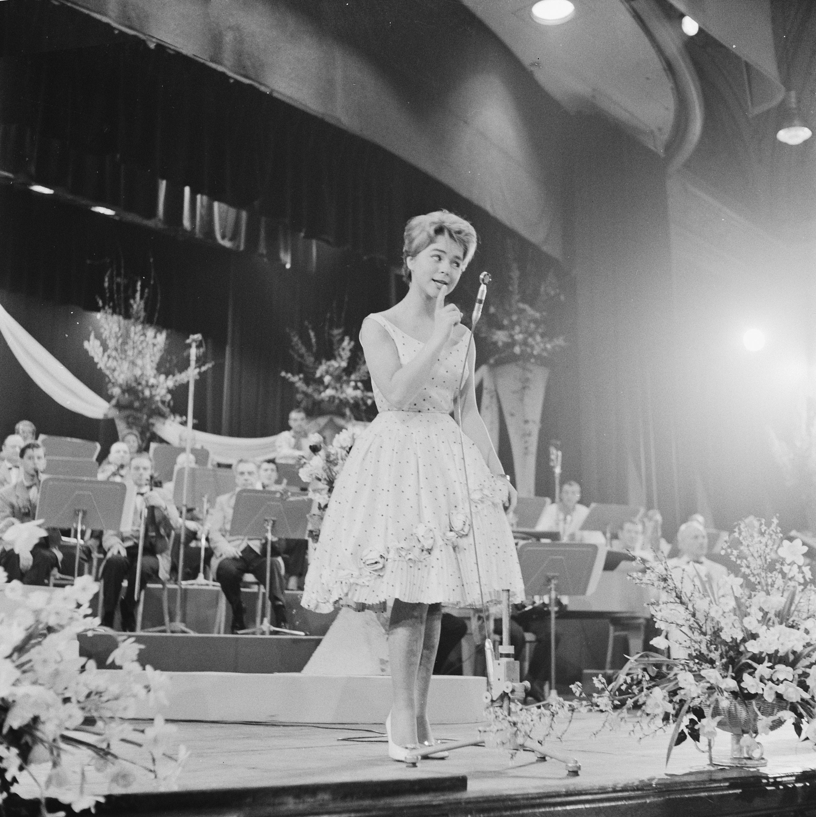 Collectie / Archief : Fotocollectie Anefo Reportage / Serie : [ onbekend ] Beschrijving : AVROs danstoernooi in het Kurhaus te Scheveningen optreden van Conny Froboess Datum : 13 februari 1960 Locatie : Scheveningen, Zuid-Holland Trefwoorden : Optreden, danstournooien Persoonsnaam : Conny Froboess Instellingsnaam : Kurhaus Fotograaf : Behrens, Herbert / Anefo Auteursrechthebbende : Nationaal Archief Materiaalsoort : Negatief (zwart/wit) Nummer archiefinventaris : bekijk toegang 2.24.01.03 Bestanddeelnummer : 911-0298